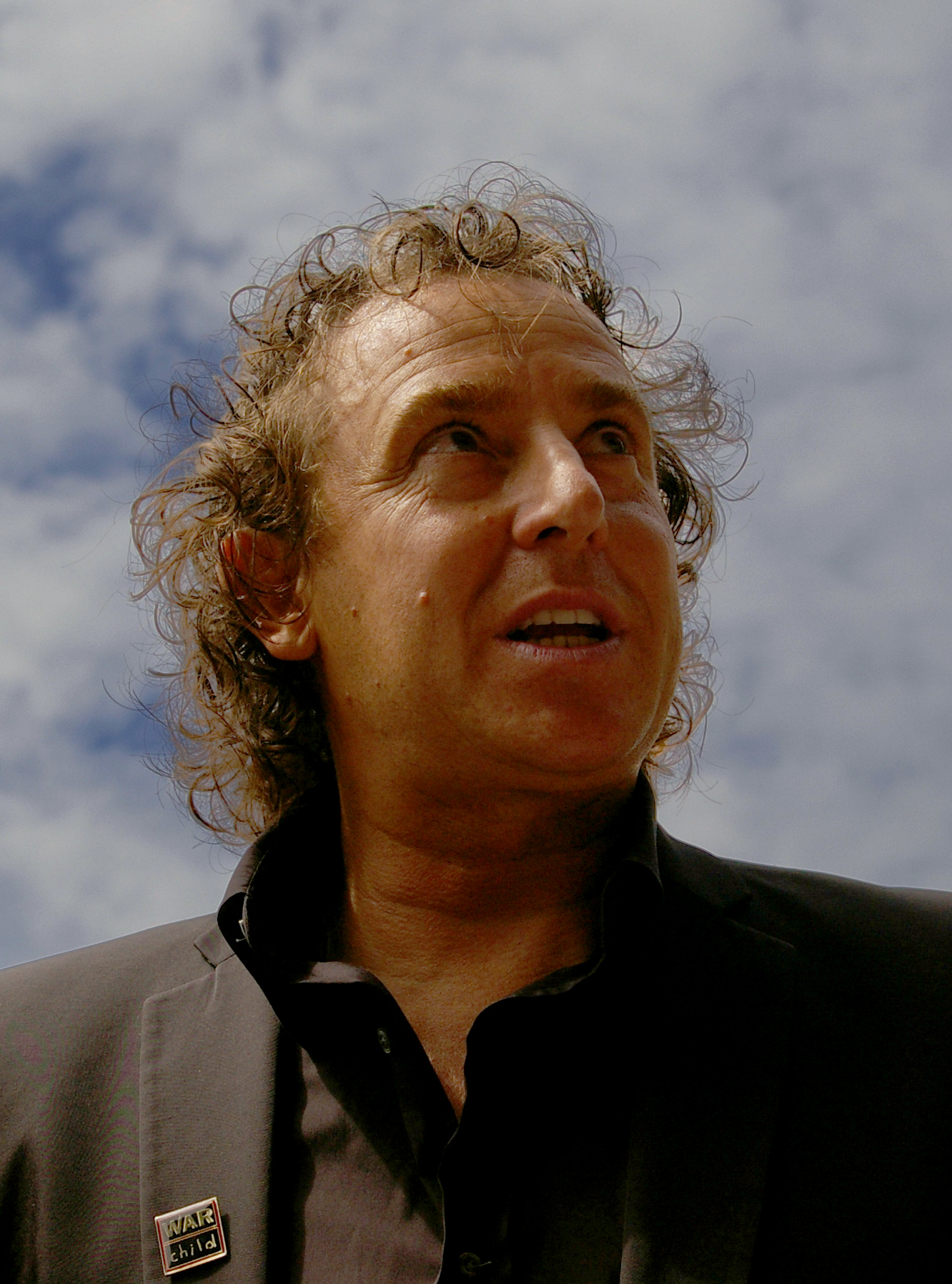 Foto van Marco Borsato tijdens het akkoord van Schokland op 30 juni 2007.